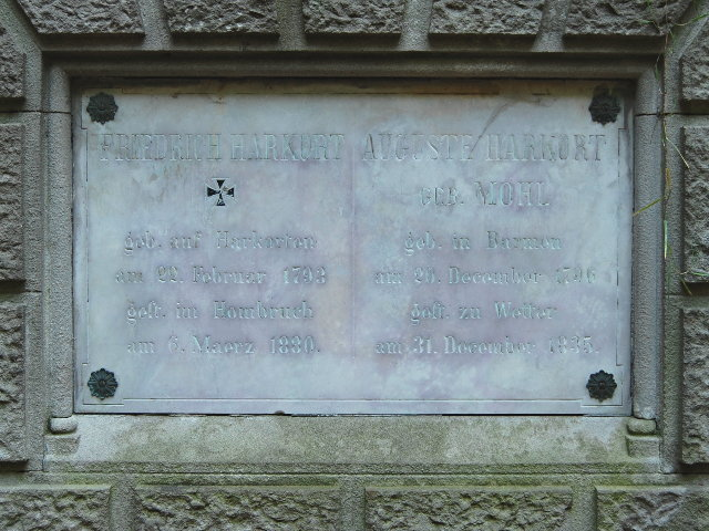 Gedenkplatte für Friedrich Harkort und seine Ehefrau Auguste Harkort, Erbbegräbnisstätte Schede, Herdecke